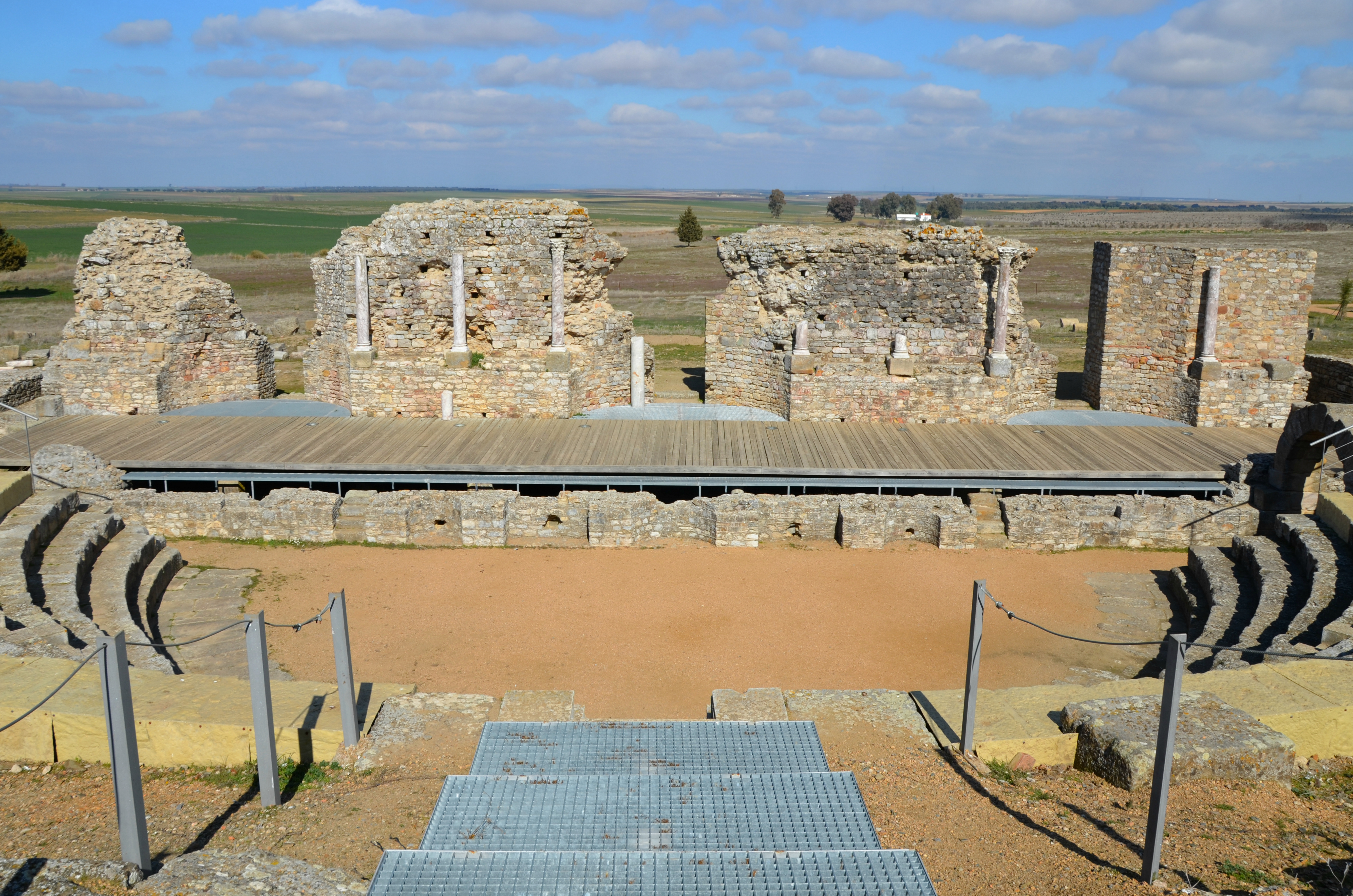 Regina Turdulorum, Extremadura, Spain